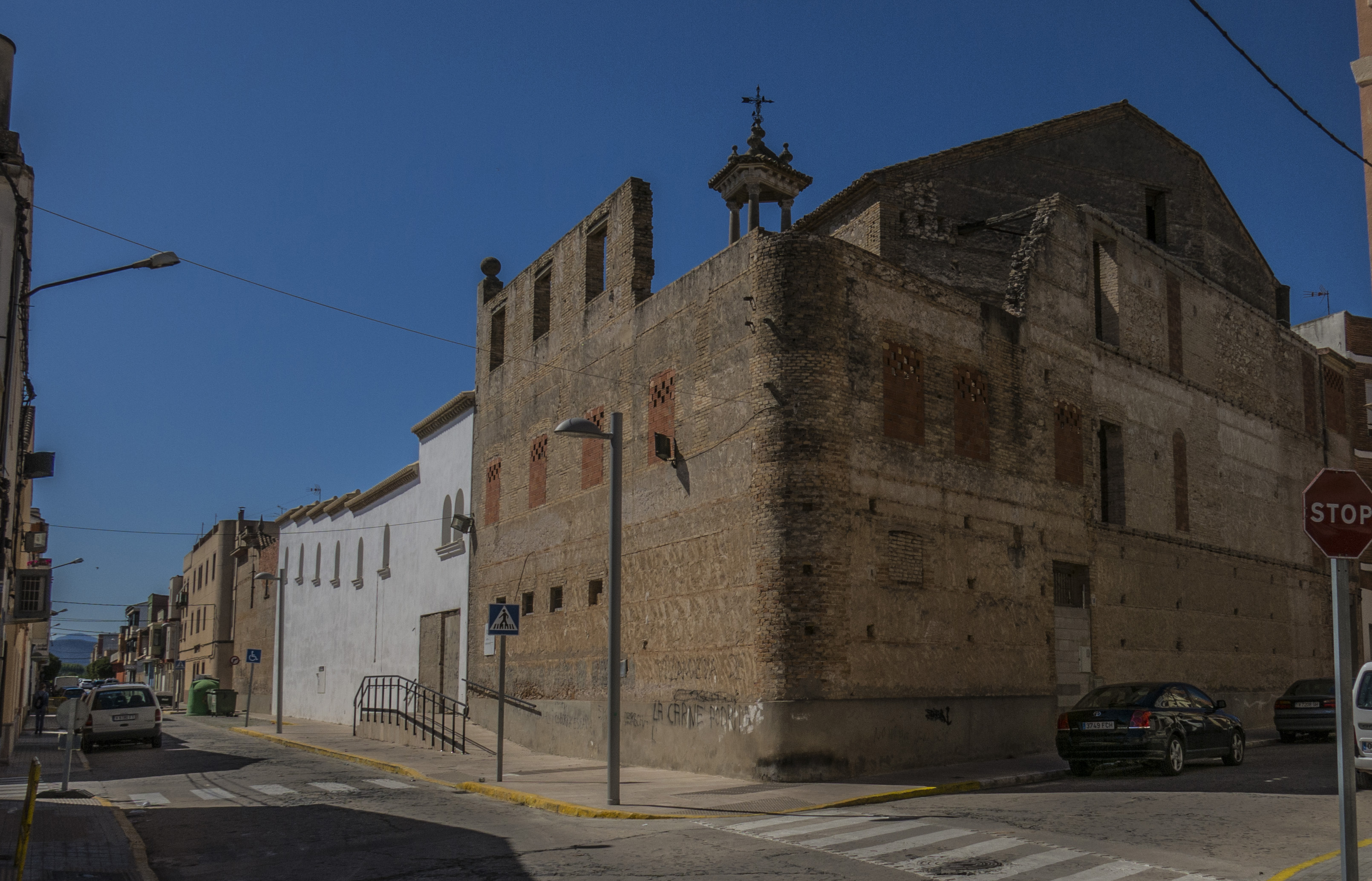 Cine California, en el carrer Sant Josep número 16, en Vilanova de Castelló (Valéncia). Obra de l'arquitecte suecà Joan Guardiola, ca. 1950.